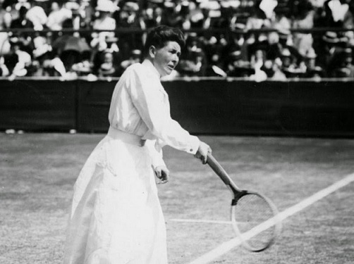 Charlotte Reinagle Cooper (1870-1966), English Tennis player, Wimbledon and Olympic champion